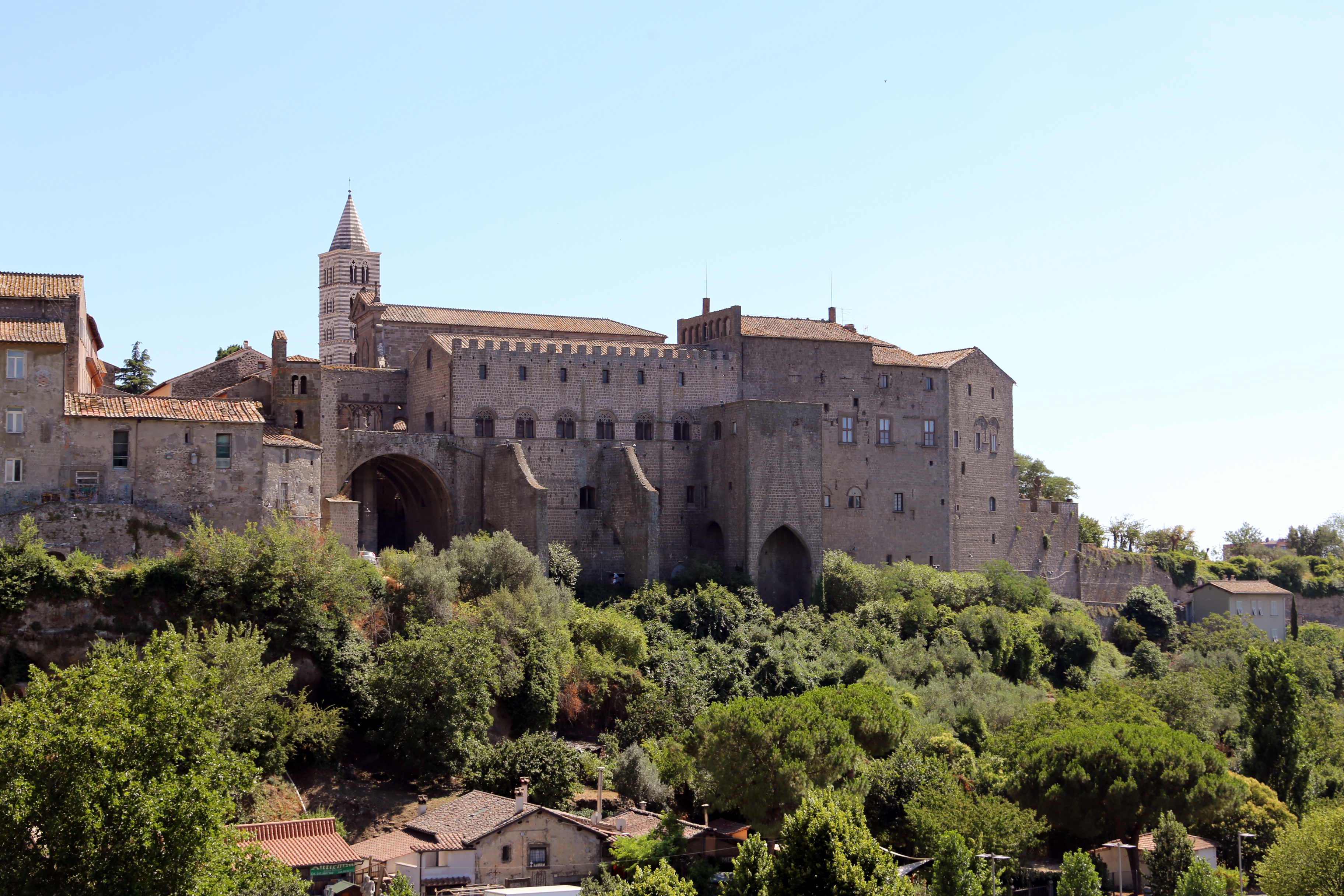 Museo del Colle del Duomo (Viterbo) - Palazzo dei Papi This is a photo of a monument which is part of cultural heritage of Italy.